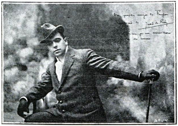 Foto publicada originalmente nas páginas de Fon-Fon. Texto que a acompanhava: “Photographia enviada ao Fon-Fon pelo scintillante chronista João do Rio (Paulo Barreio), actualmente colhendo observações na Europa para novos e curiosos livros.”